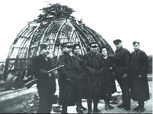 4-ая автомобильная бригада вошла в Берлин вместе со всеми войсками 1-го Украинского фронта. В течение 3 - 4 дней шло уничтожение отдельных групп несдавшихся немцев. Лишь на пятый день удалось запечатлеть на фотографии свою победу. Генерал Лебедев В.Г. в центре группы у купола рейхстага.